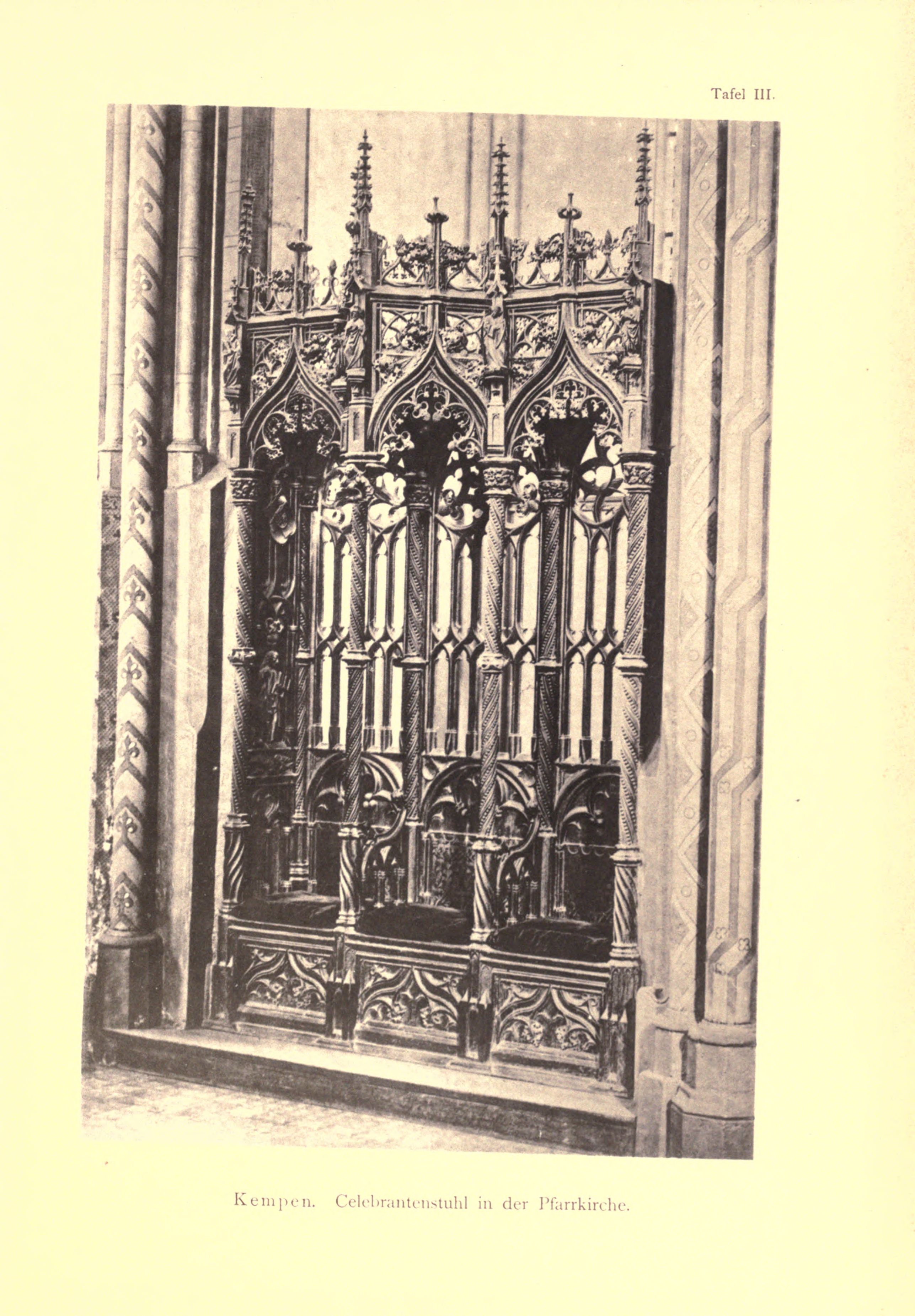 Die Kunstdenkmäler der Rheinprovinz - Band 1